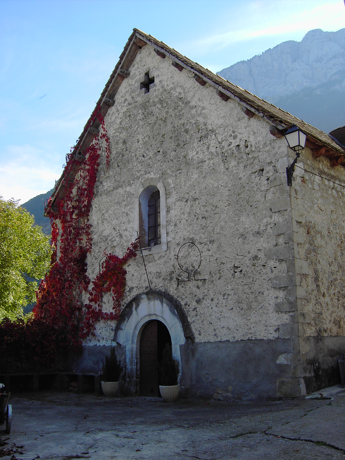 La fachada de la iglesia de Santa María de la Asunción, por donde se encuentra el acceso a la misma, en Saravillo